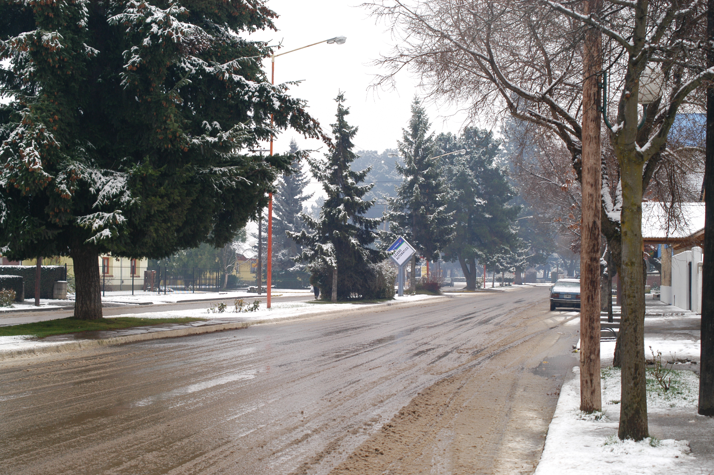 Pueblo de Trevelin, Argentina, en invierno.